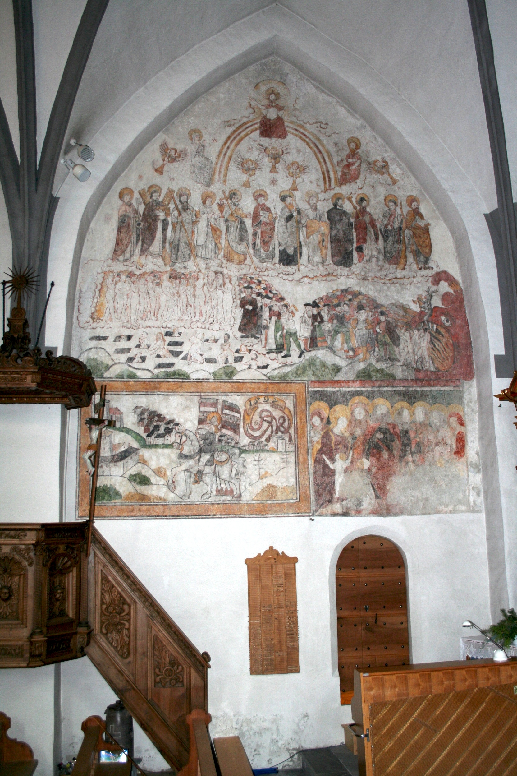 Kirche von Tumegl/Tomils, bemalt von Hans Ardüser